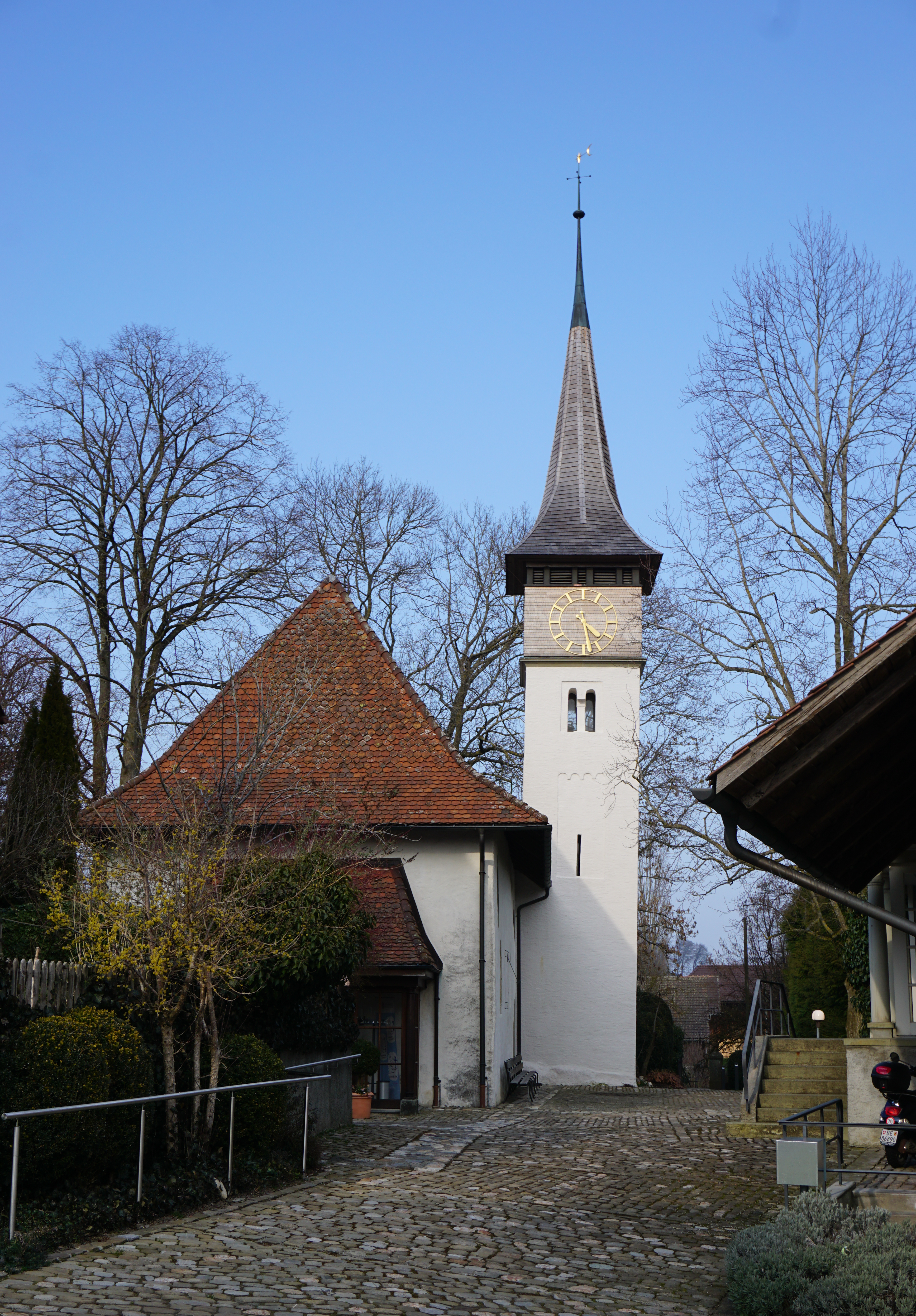 Kirche Meikirch von Westen